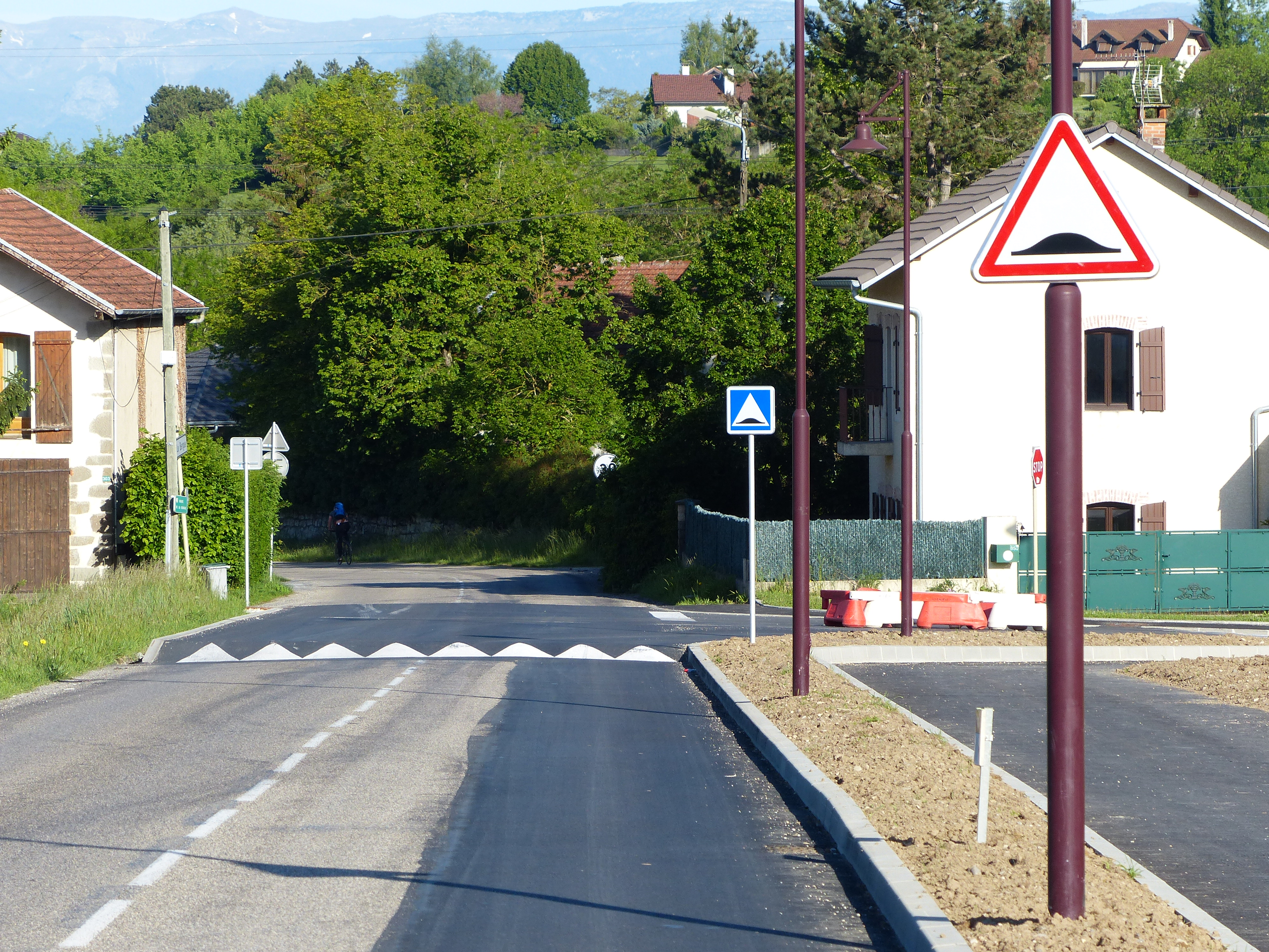 Panneaux A2b et C27 posés au printemps 2017, D183, La Bergue, Cranves-Sales, Haute-Savoie, France.